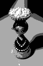 La imágen representa como quedaría una imágen si se codifica con dos bits